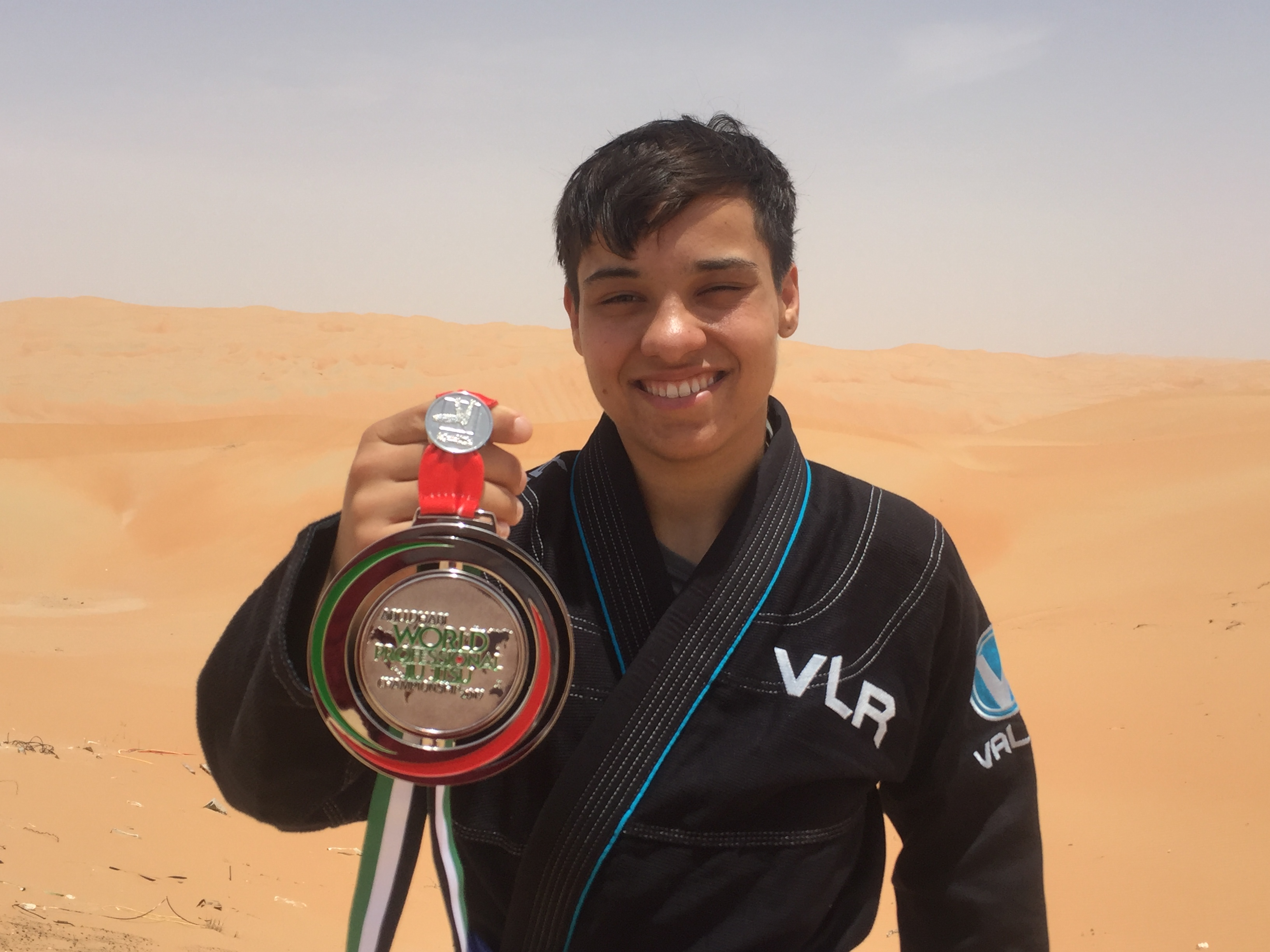 Kanew mit ihrer Silbermedaille von den UAEJJF Pro Worlds